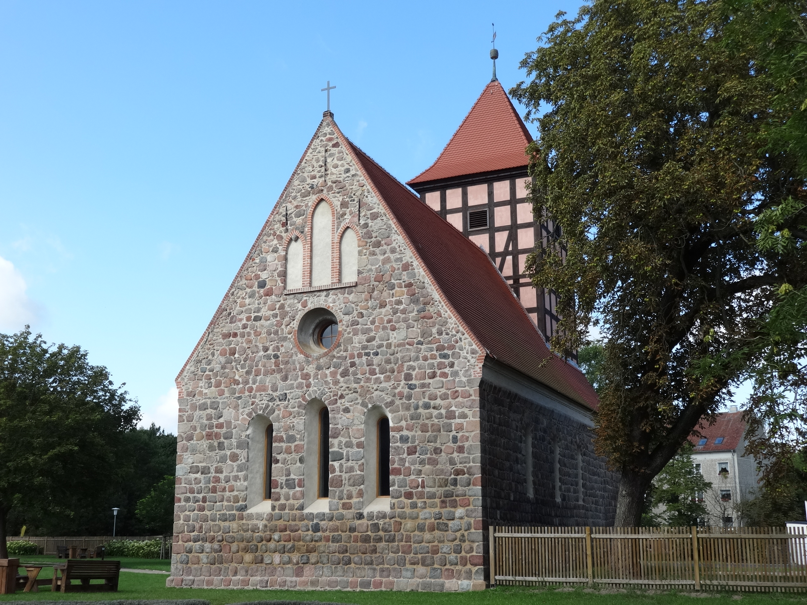 Frühgotische Feldsteinkirche in Malchow, ein Ortsteil von Göritz im Landkreis Uckermark aus der zweiten Hälfte des 13. Jahrhunderrs